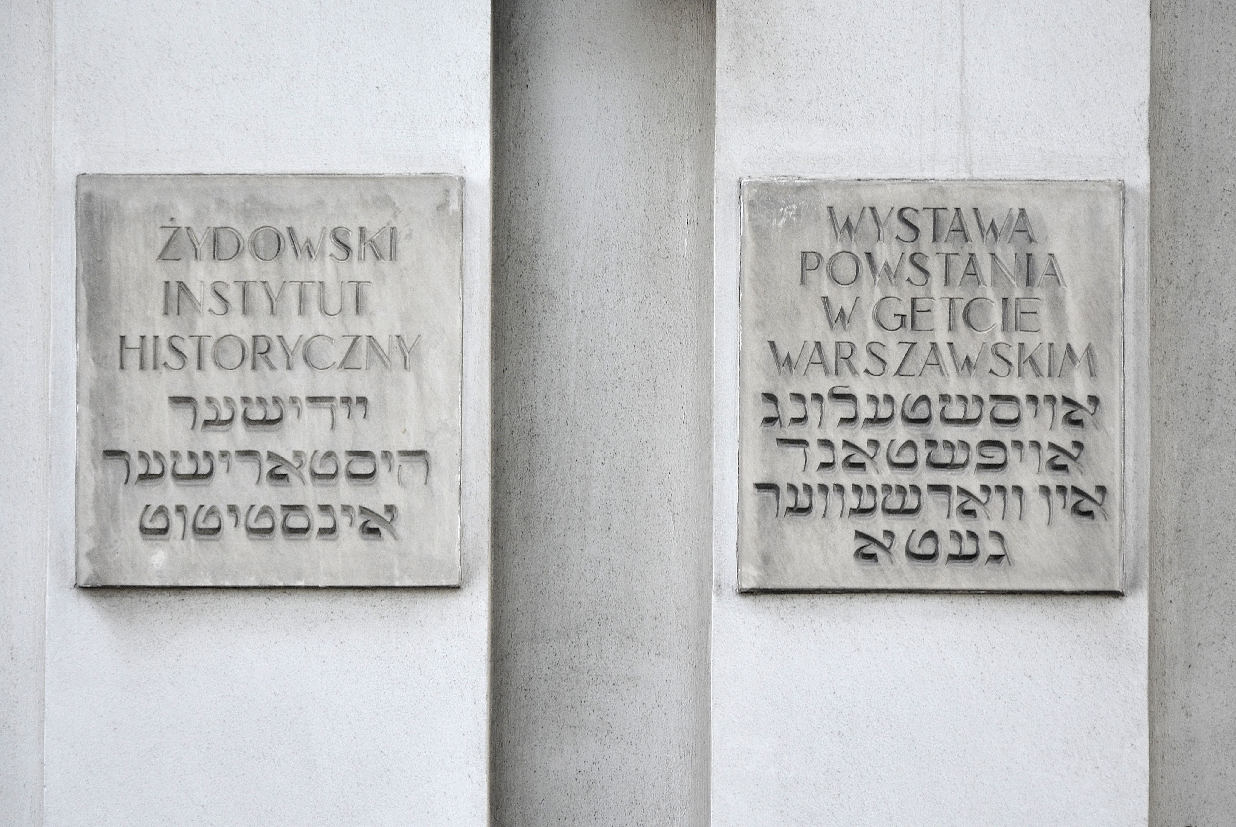 Tablice przy wejściu do Żydowskiego Instytutu Historycznego w Warszawie